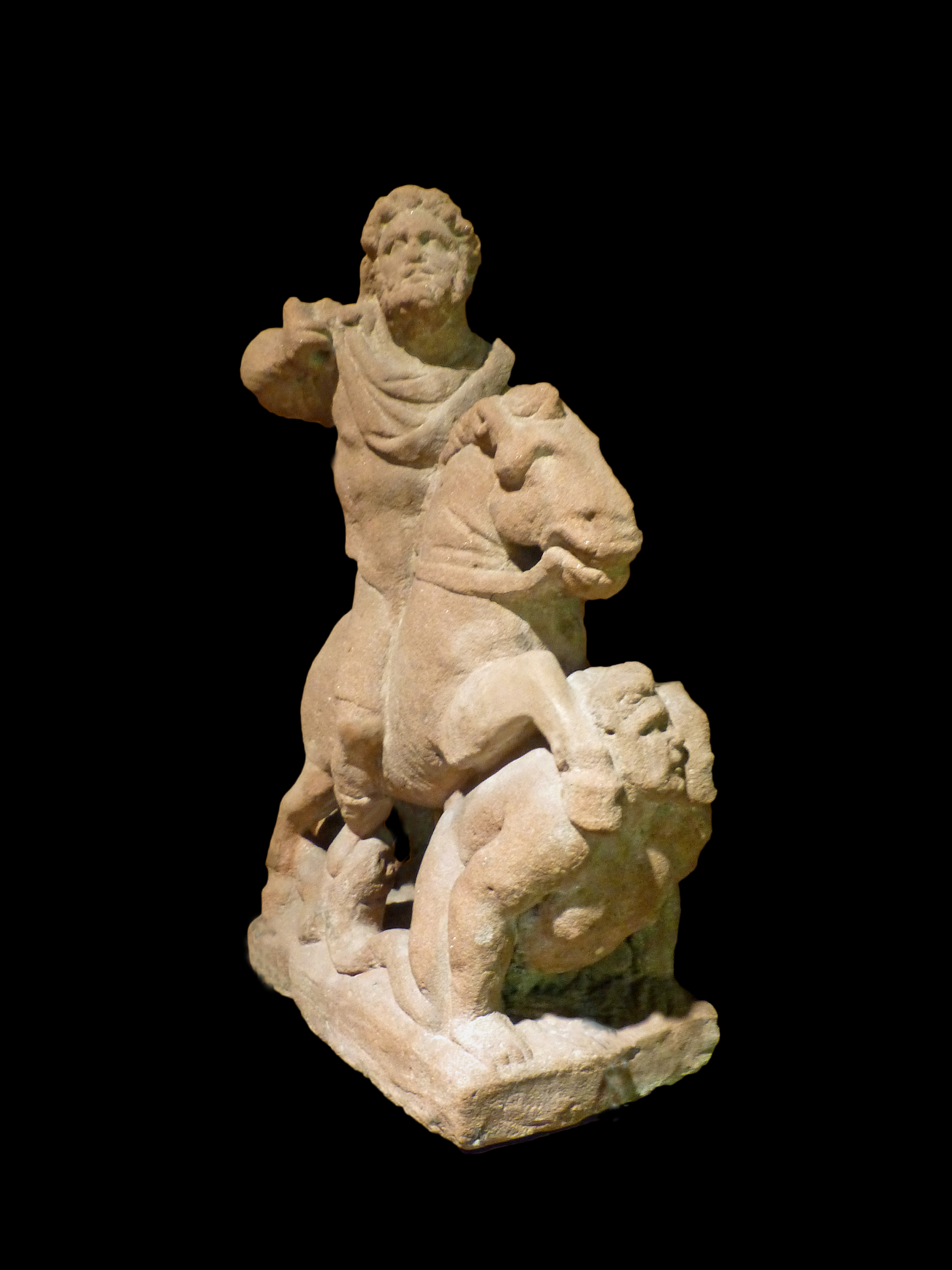 Musée historique de Haguenau (Bas-Rhin) : groupe sculpté de Jupiter Taranis terrassant un monstre anguipède, découvert à Seltz en 1846. Grès IIe siècle. N° R192a